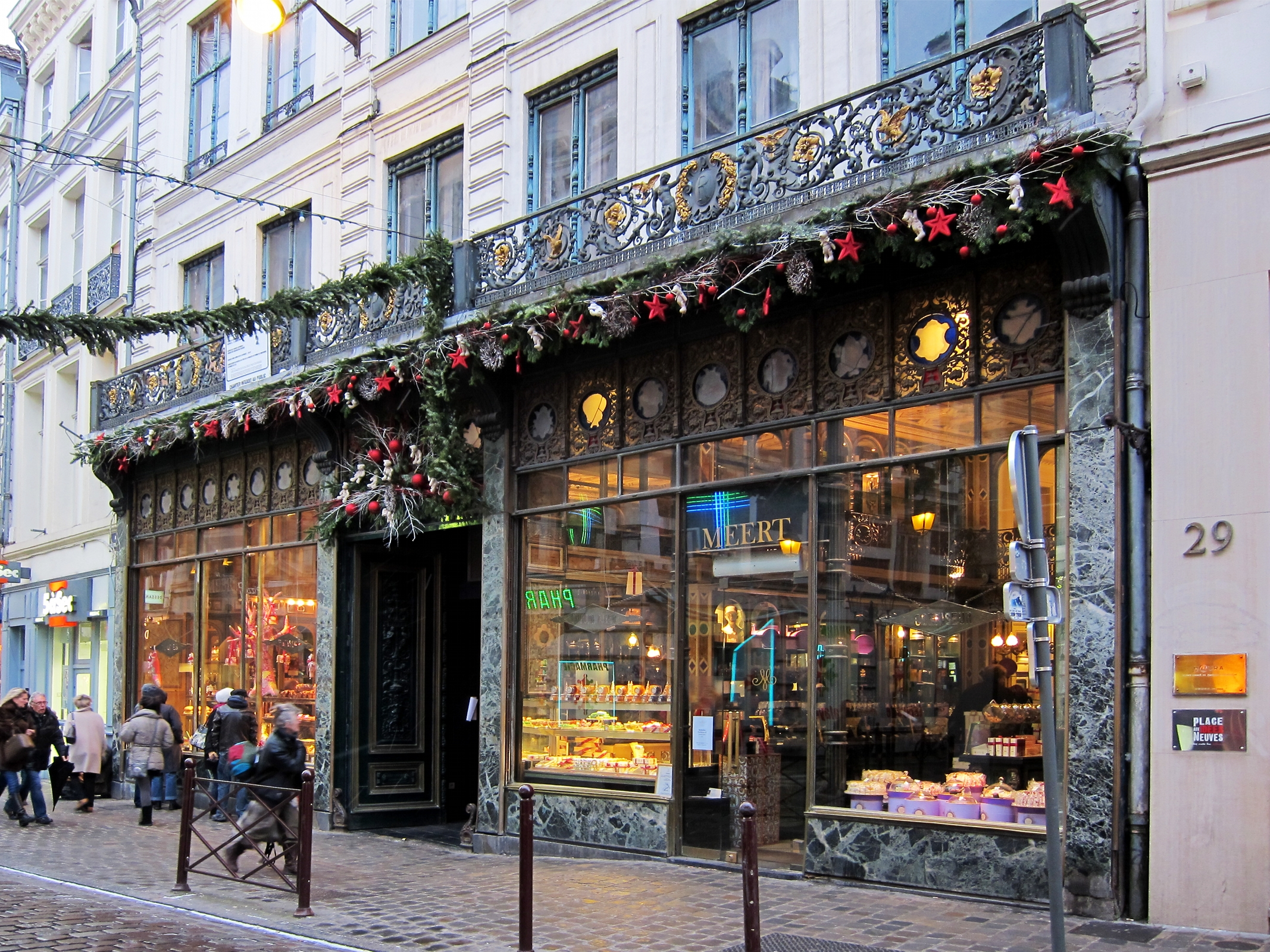 La patisserie Meert à Lille (monument historique).